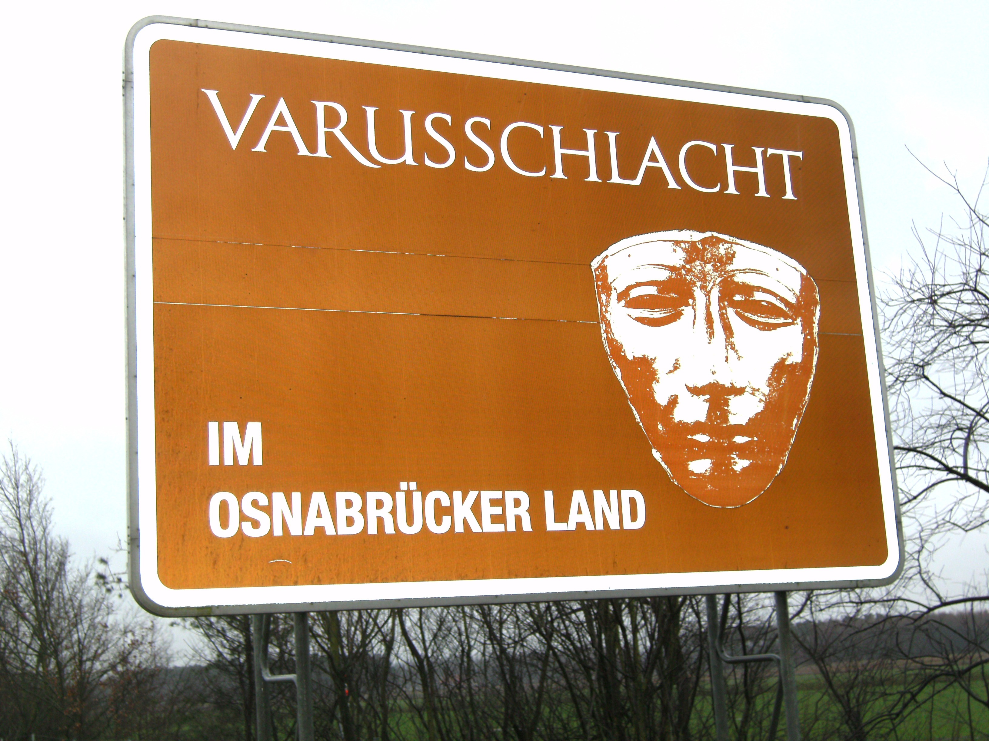 Street sign at motorway "Varusschlacht im Osnabrücker Land"